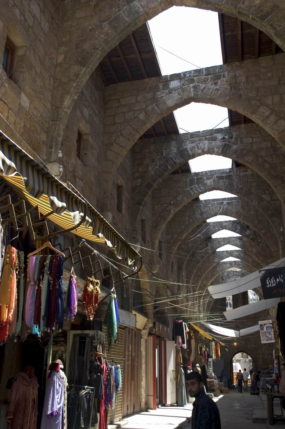 Zoco de Tripoli